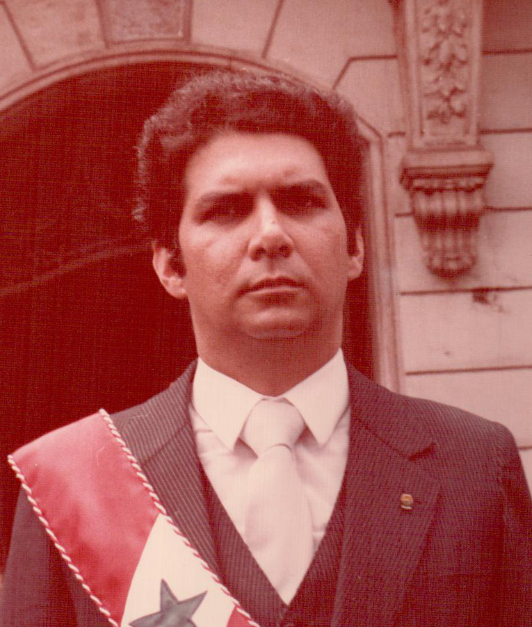 O Governador Jader Barbalho durante seu primeiro governo do estado do Pará